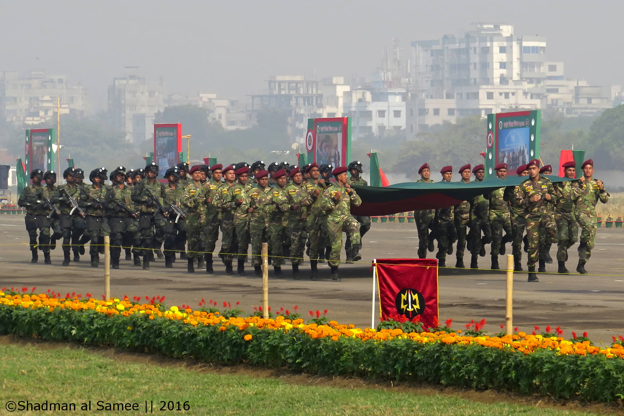 VGTJ/VDP 2016.